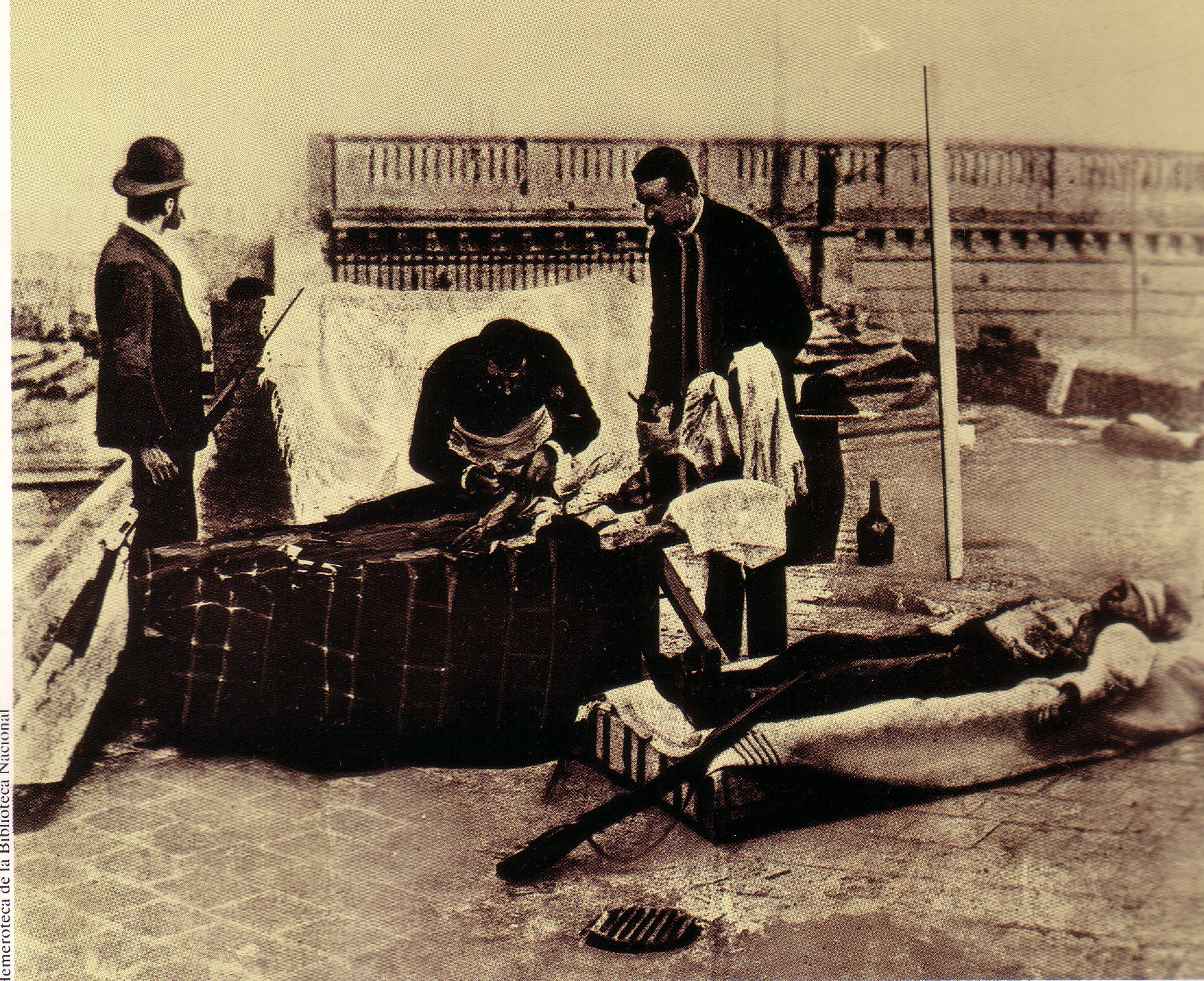 Revolución de 1890. Herido en azotea. Buenos Aires.